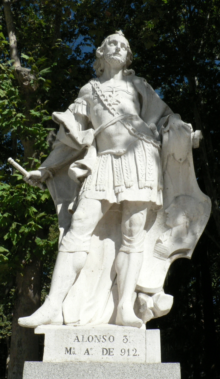 Alfonso Ill, rey astur-leonés, conocido con el sobrenombre de el Magno nació en Oviedo el año 848, hijo primogénito de Ordoño 1 y de Da Nuña, Su padre le aso-ció a las tareas de gobierno a los 14 años. Estátua en piedra blanca, en la Plaza de Oriente (Madrid)